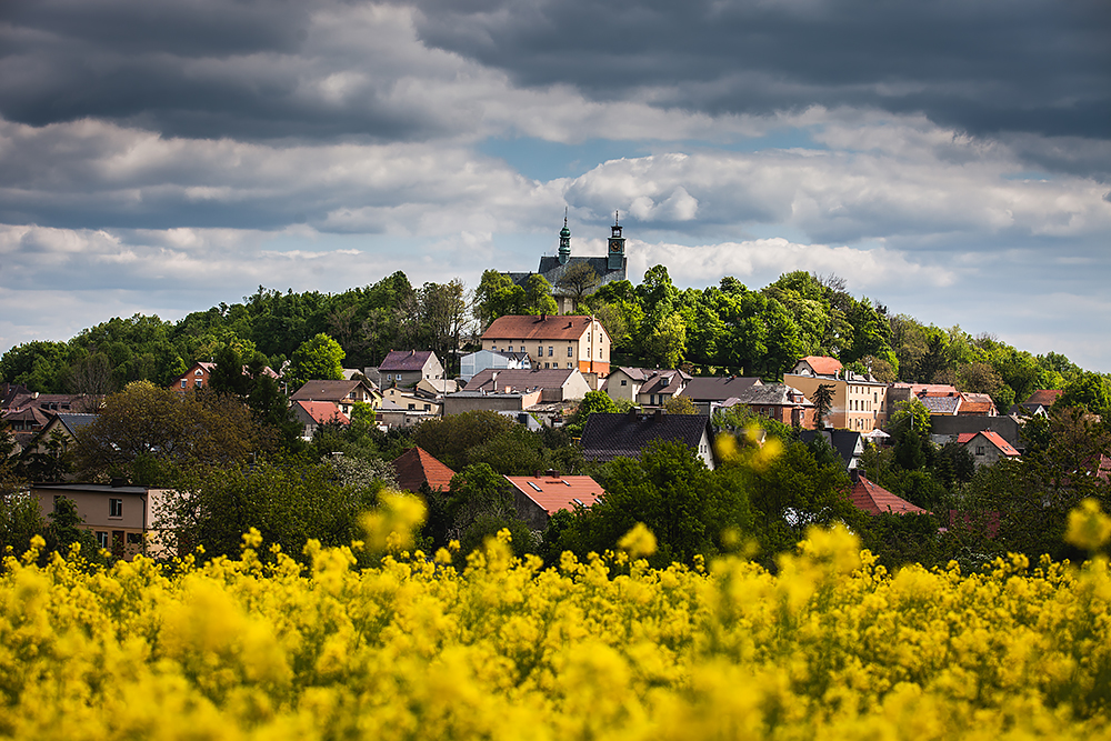 Widok na Górę Św. Anny od strony północnej (od strony autostrady A4).